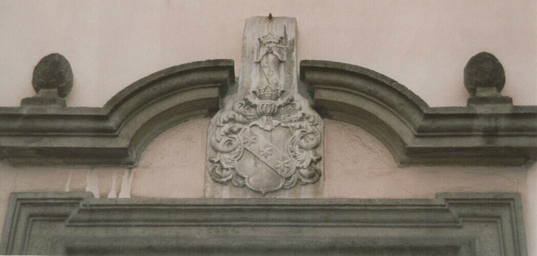 Rittergut Erkersreuth bei Selb, Lindenfels Wappen über dem Eingang